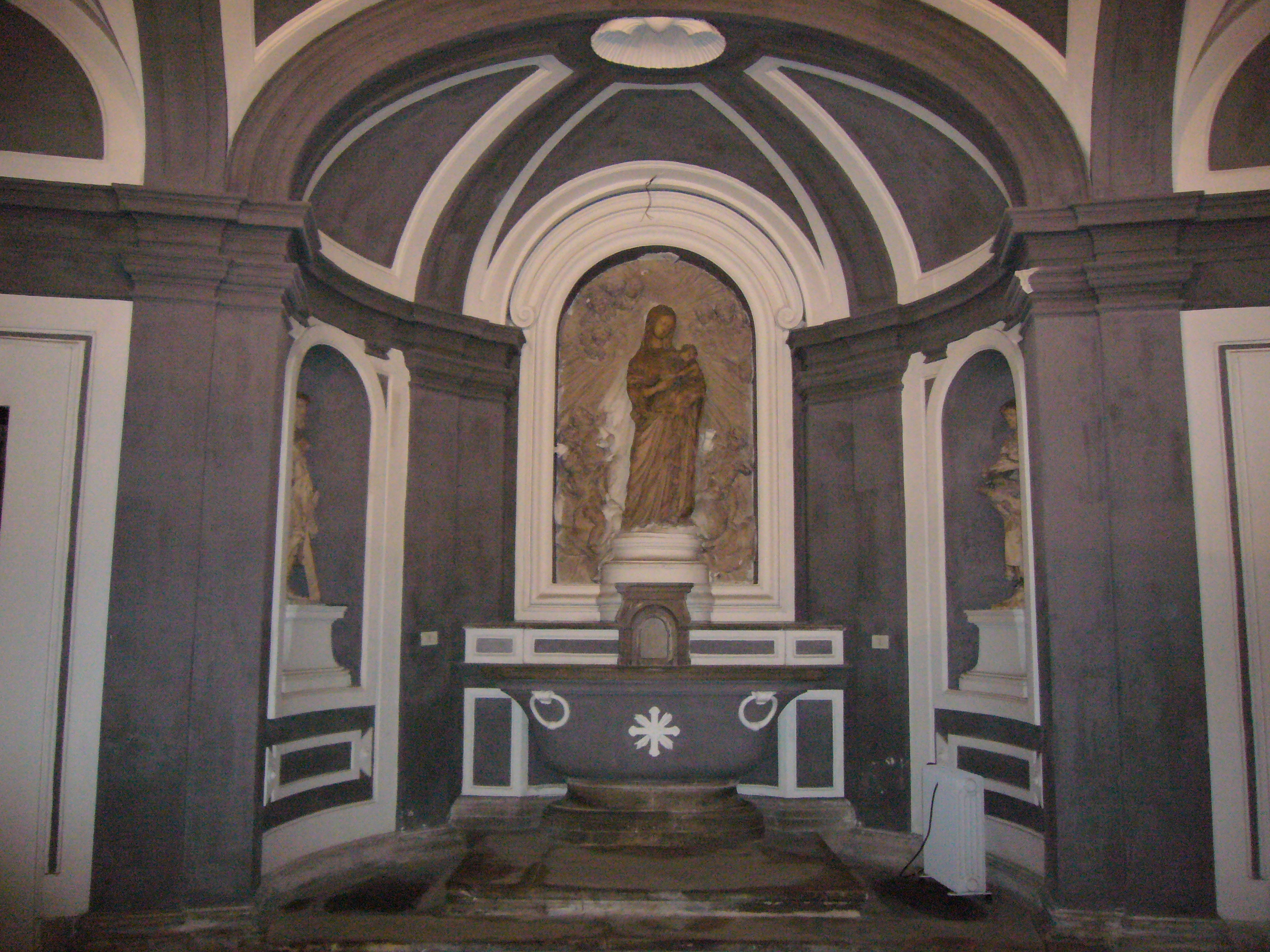 Napoli, Basilica dell'Annunziata: altare della Madonna col Bambino di Domenico Gagini.